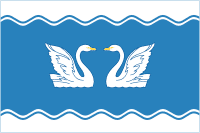 Флаг Пролетарского сельского поселения, Краснодарский край, Россия.